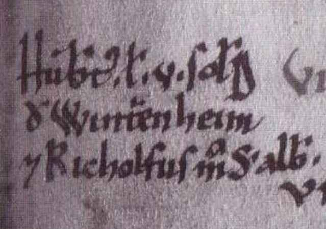 Mainzer Domnekrolog (Totengedächtnis) Eintrag vom 26. April 1100 (Ausschnitt-Klein-Winternheim)